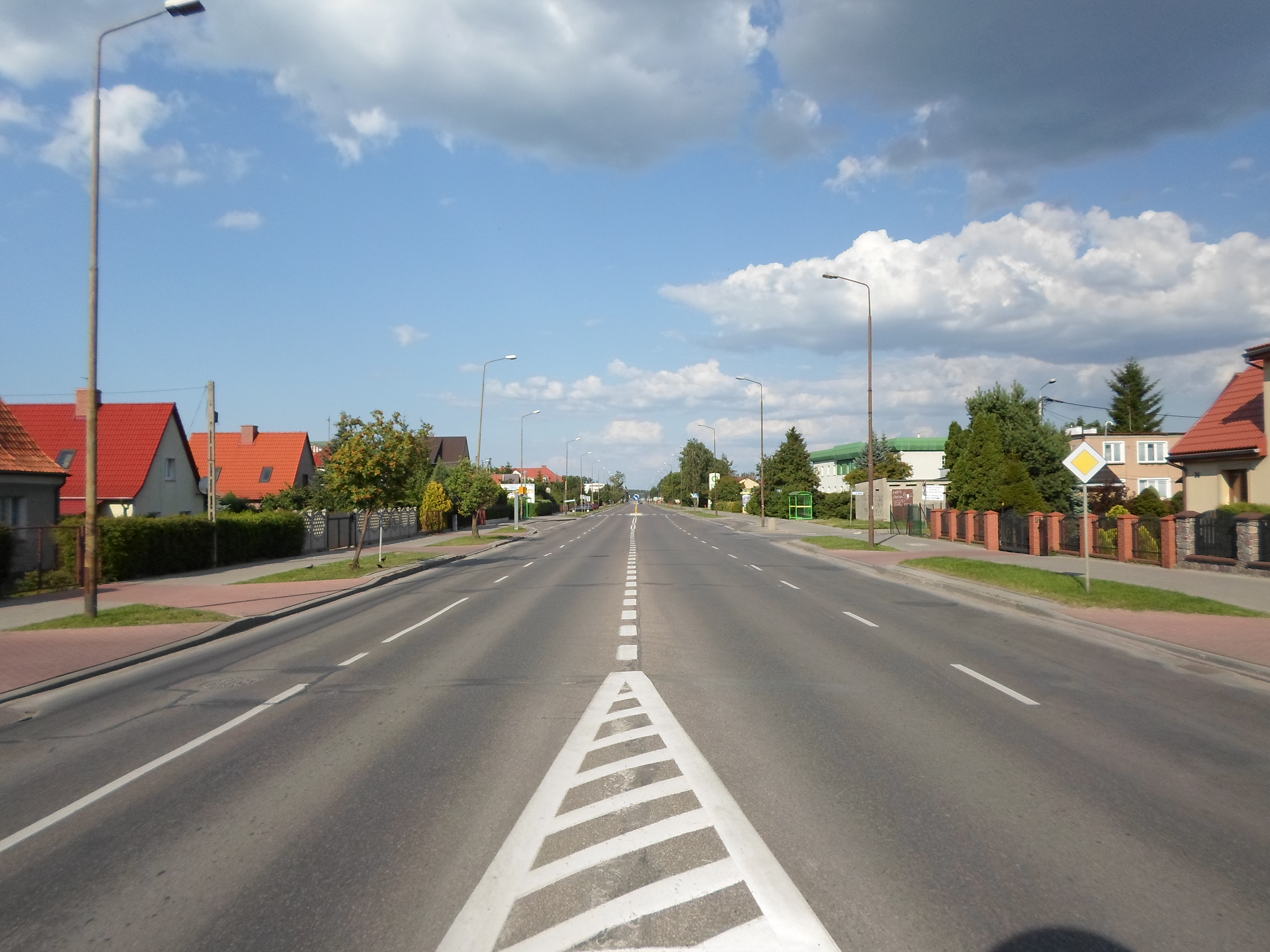 Widok na ulicę Suwalską w Ełku z wyspy azylu w kierunku wschodnim